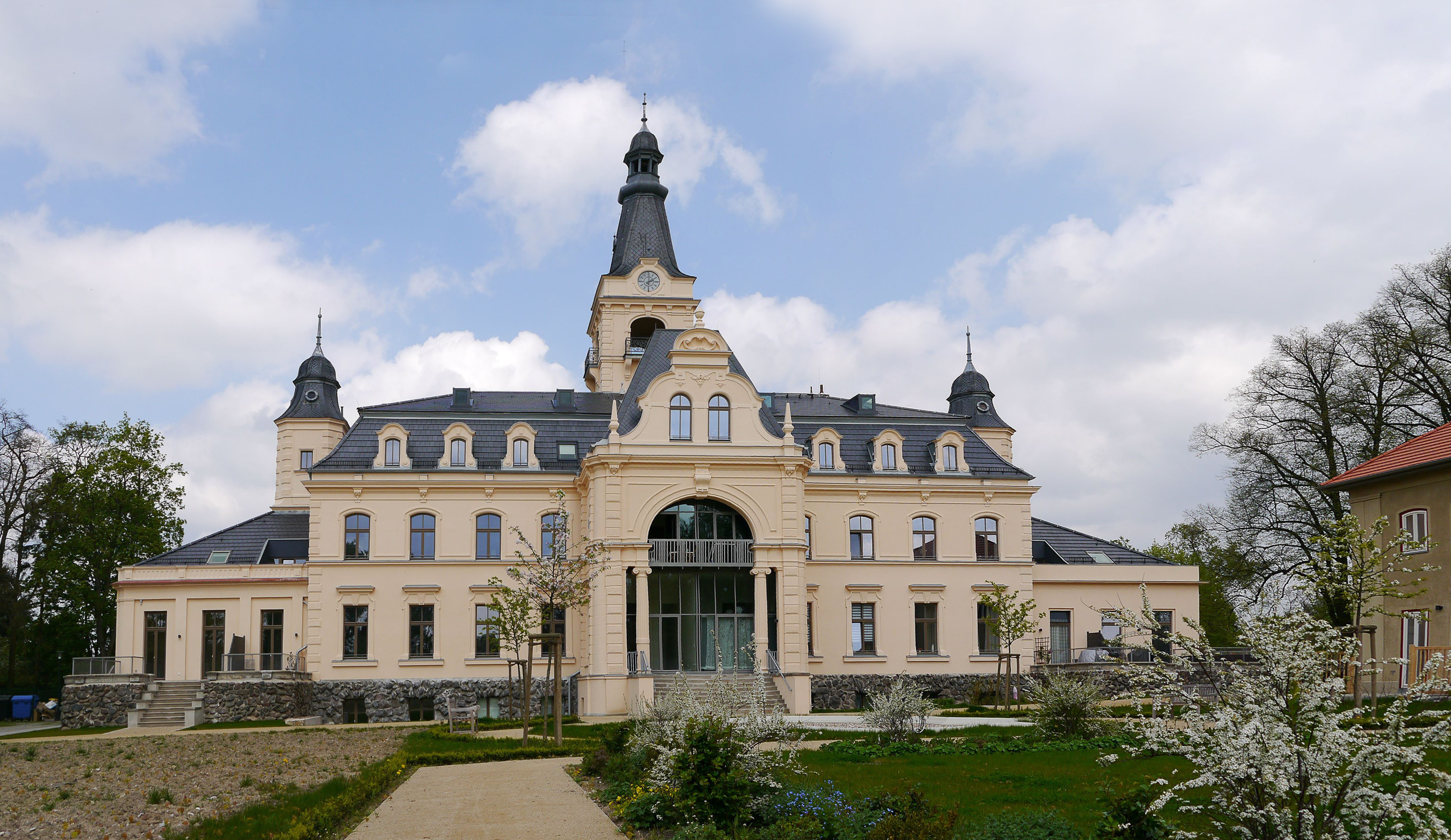 Baudenkmal Lindenallee 29, Gutshaus Güterfelde (Schloss), Südseite, mit Lehmbau (rechts).